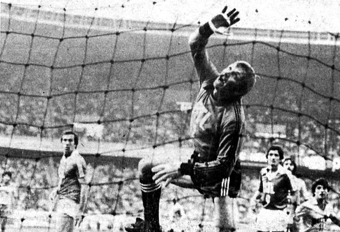 Interwencja bramkarza Mariana Szei podczas meczu w Pucharze Francji na Parc des Princes (1980)